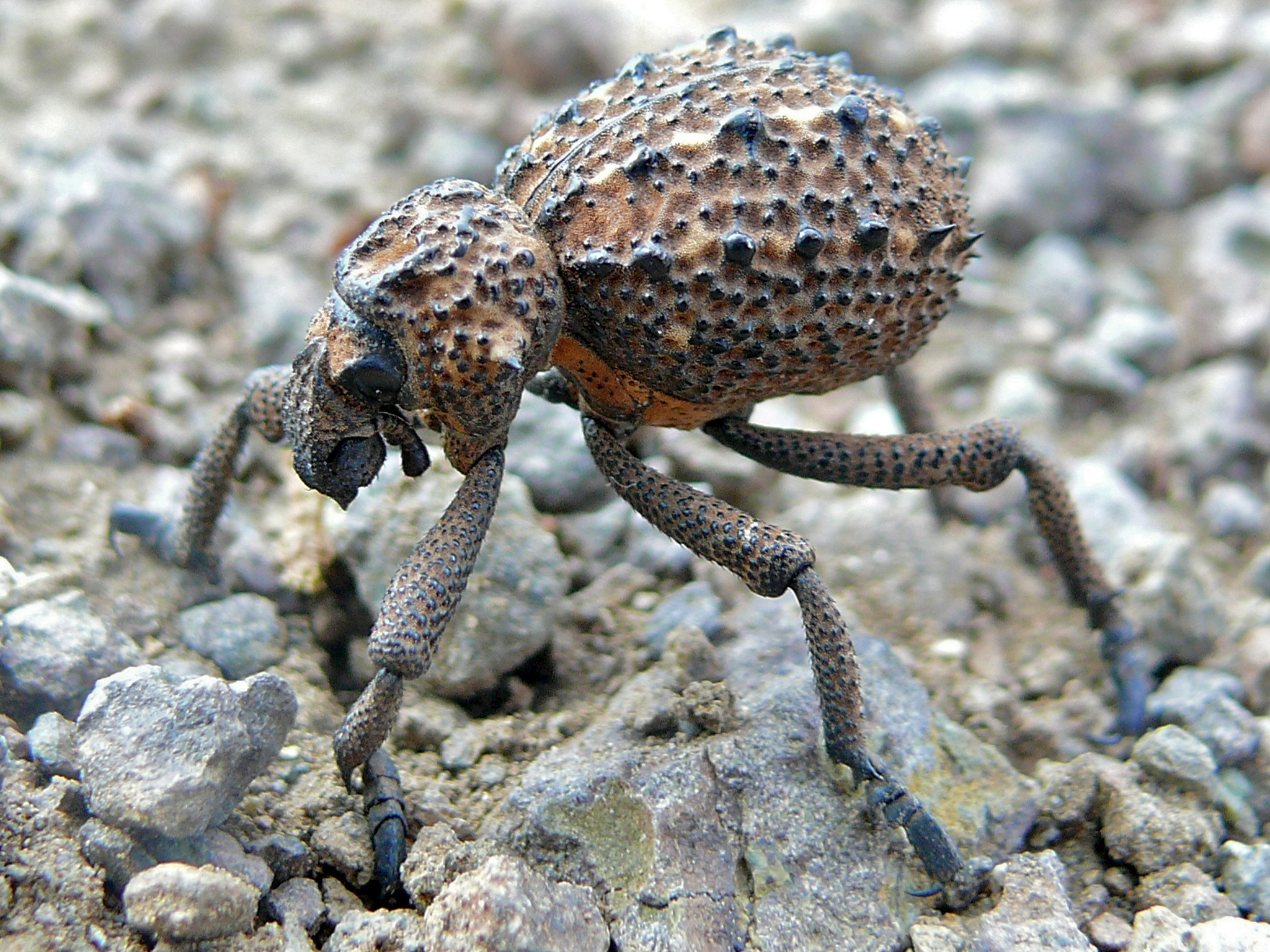 Matambeni Hide near Letaba, Kruger NP, SOUTH AFRICA